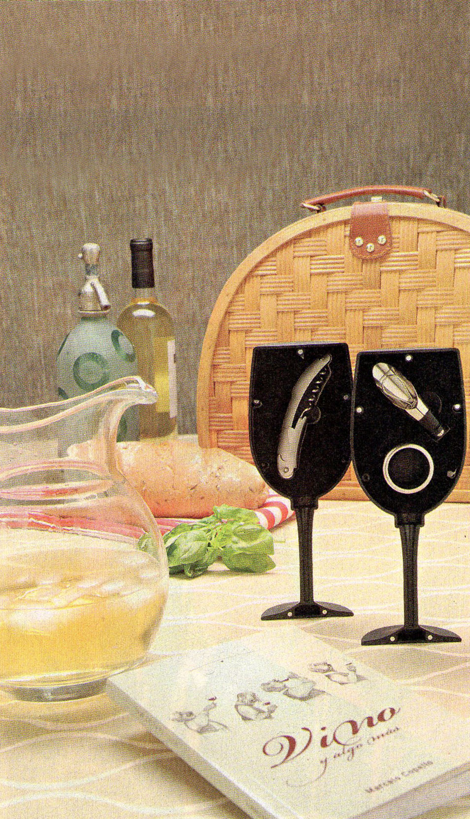 Fuente: Revista Viva 27/11/2011